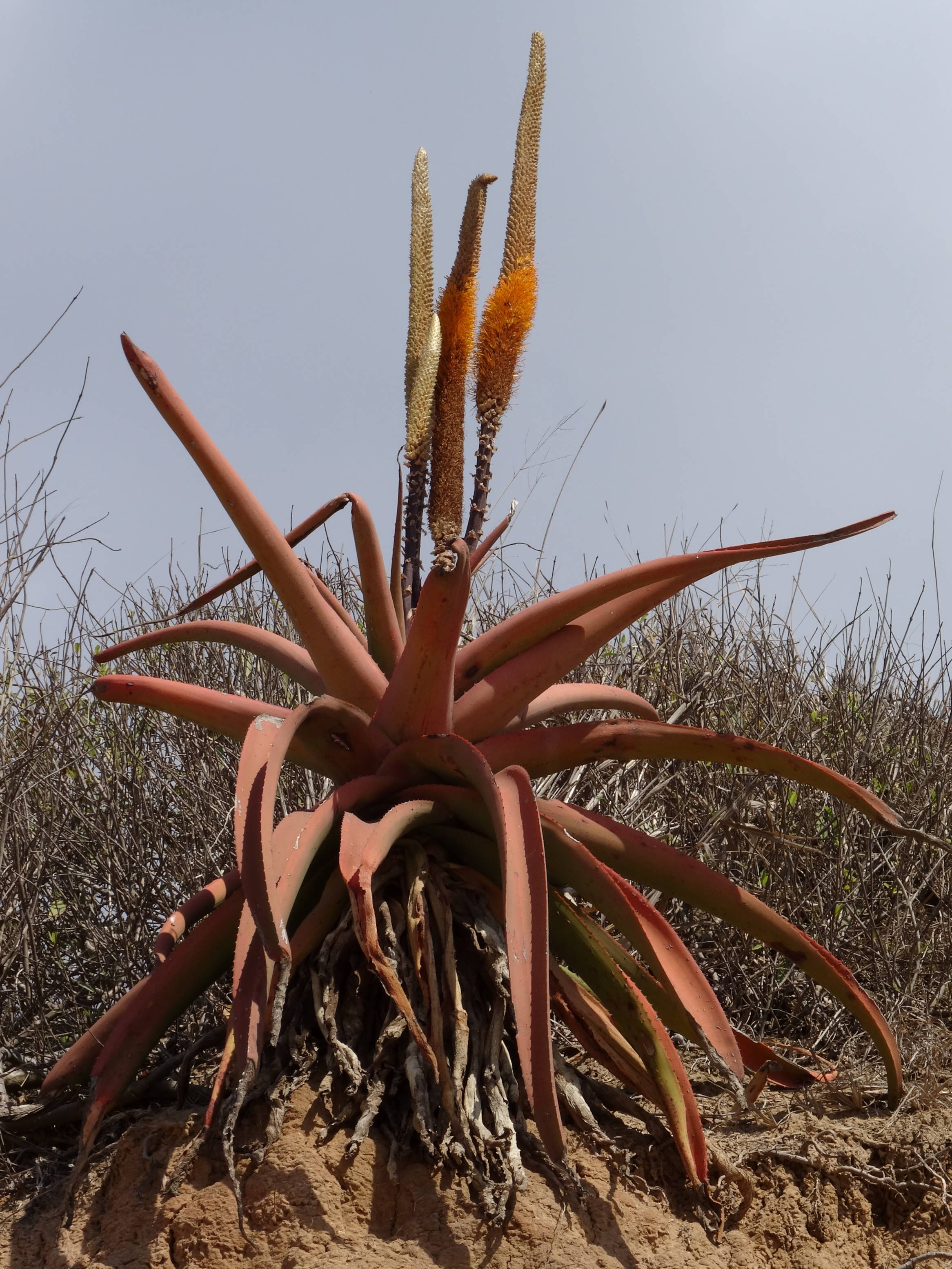 Aloe spicata 1